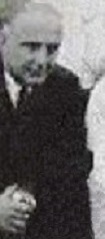 Henri Borde, entraîneur du FC Lourdes (avril 1948 - cropped).